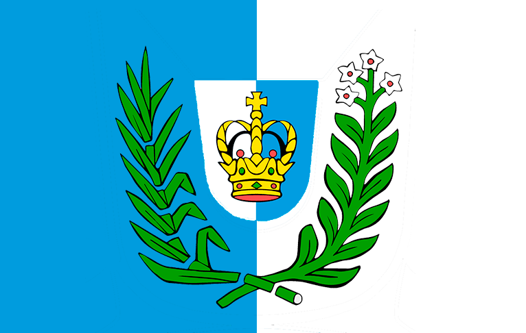 BANDEIRA MUNICIPAL DE TEODORO SAMPAIO BAHIA